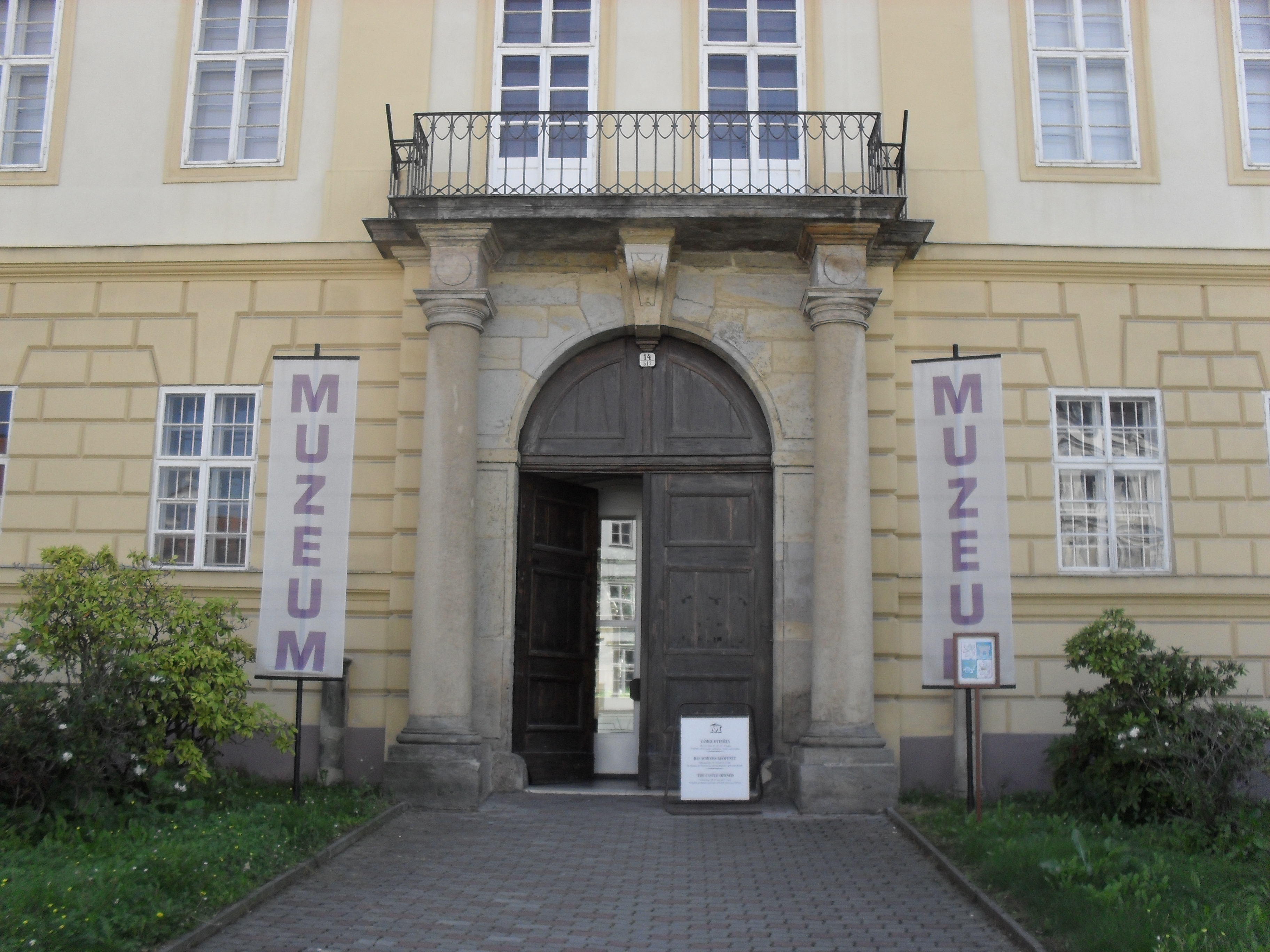 TTO: Děkanství - Teplice, Zámecké náměstí 71.